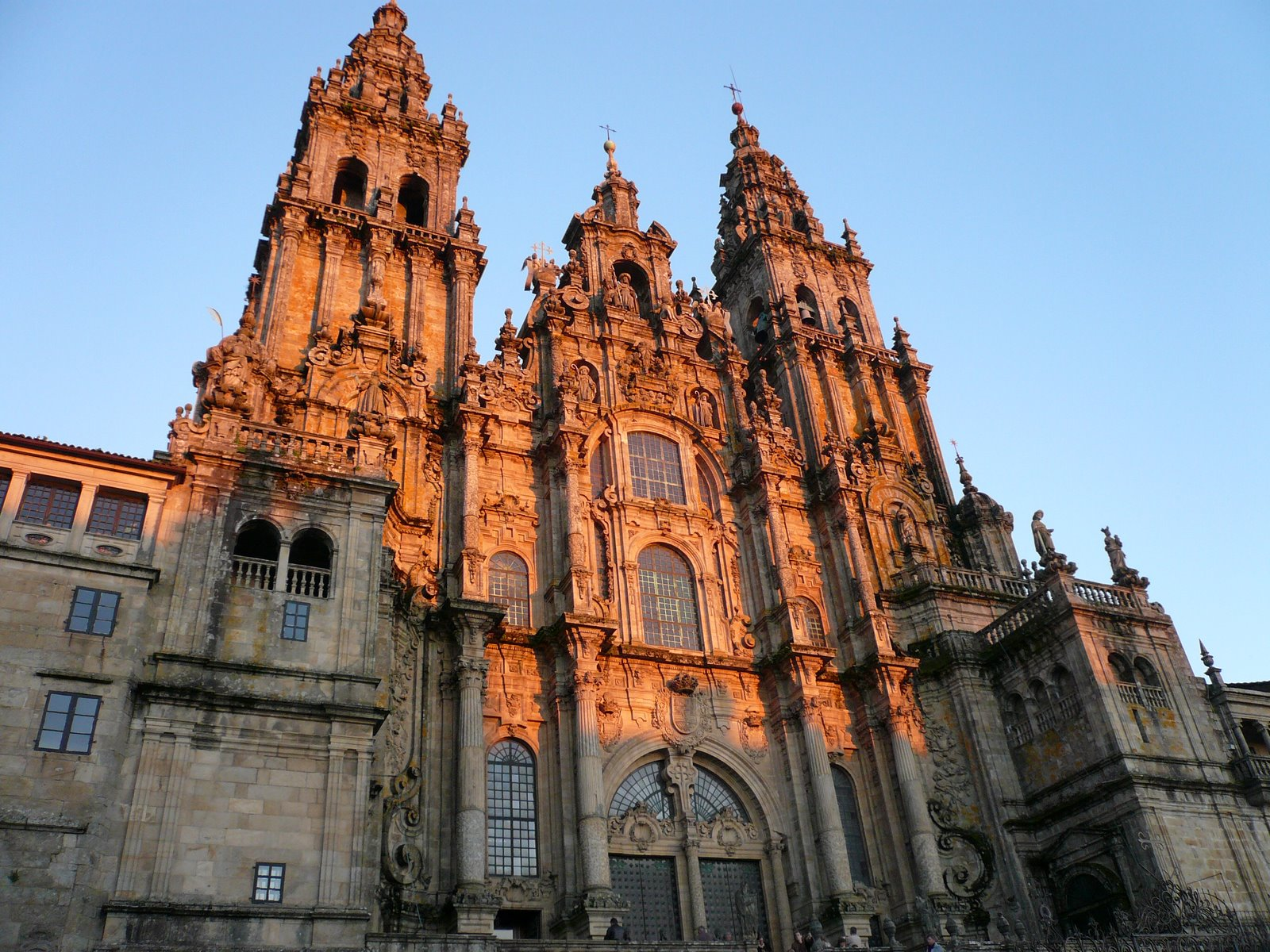 Catedral de Santiago de Compostela, Plaza del Obradoiro, atardecer en los granitos de la fachada.